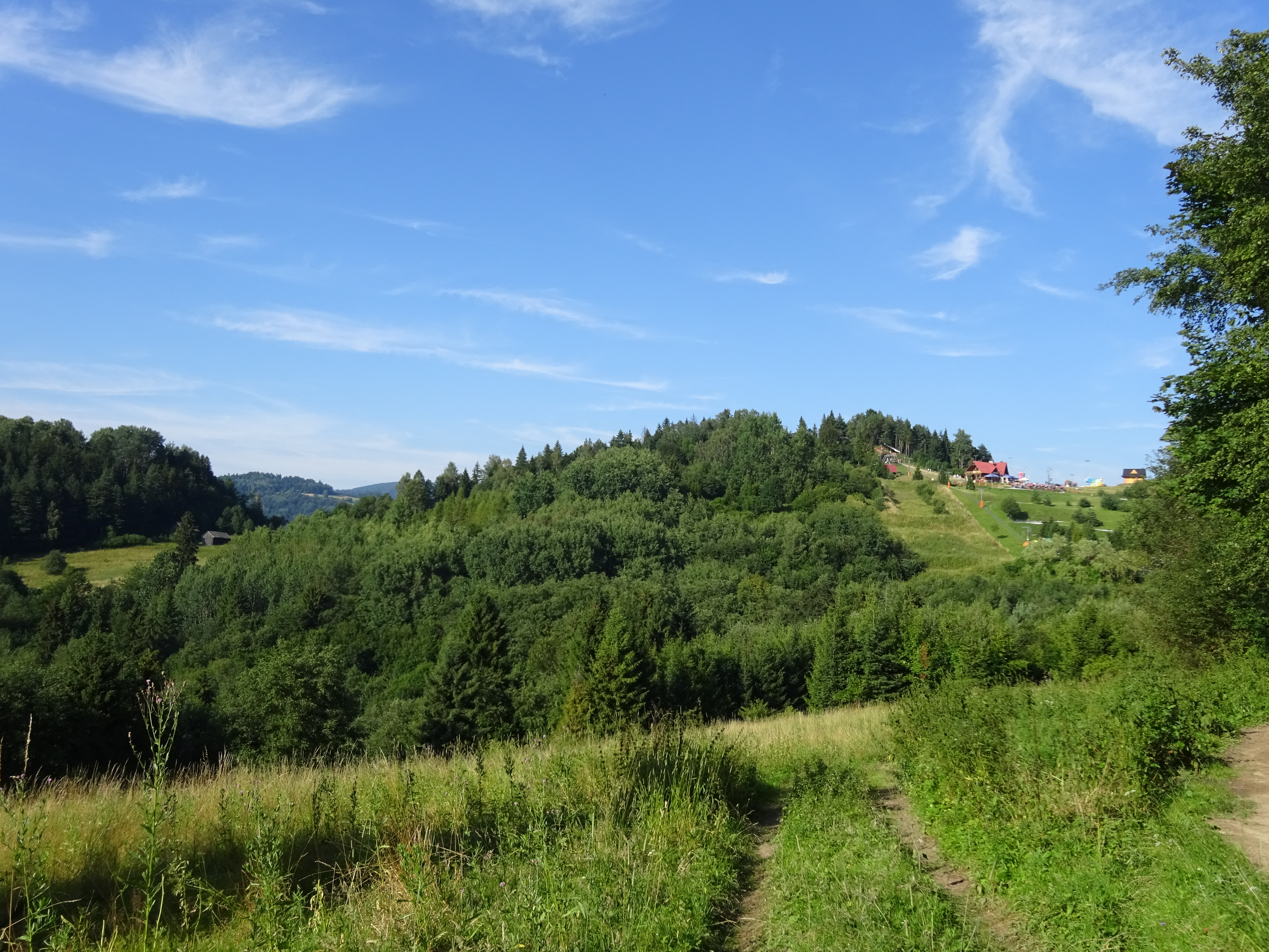 Góra Palenica w Małych Pieninach z górną stacją kolejki linowej - widok z południowego zachodu.